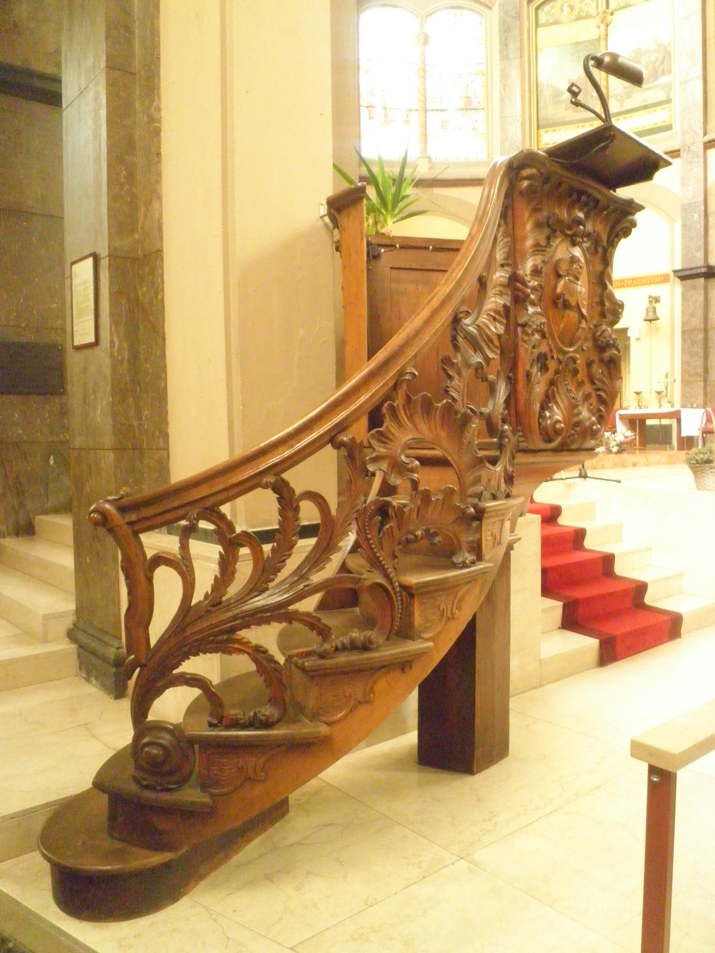 Kansel van de Koepelkerk in Hoorn. Voormalig spreekgestoelte uit De Drie Tulpen, de schuilkerk en voorloper van de Koepelkerk.